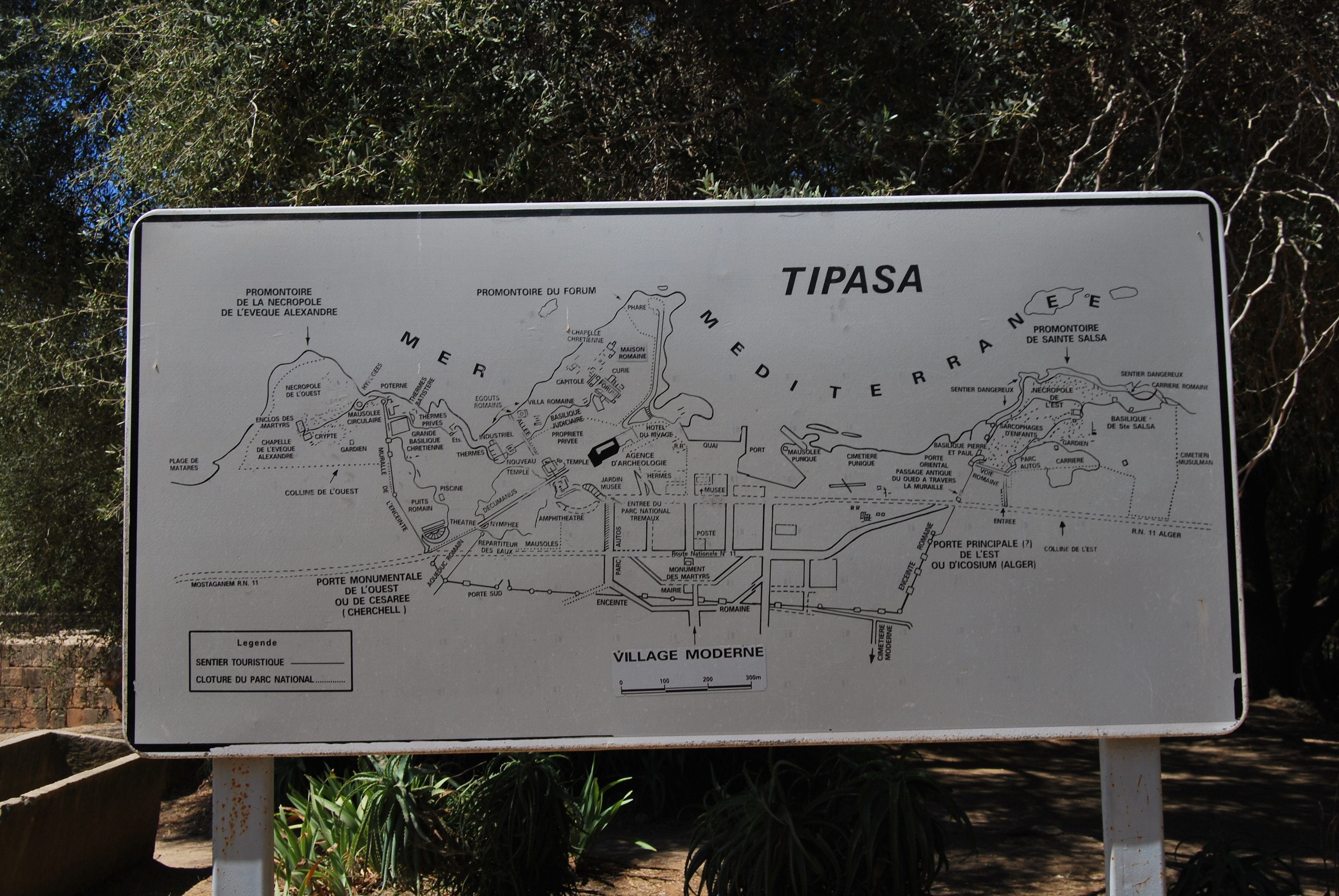 sites historiques tipaza